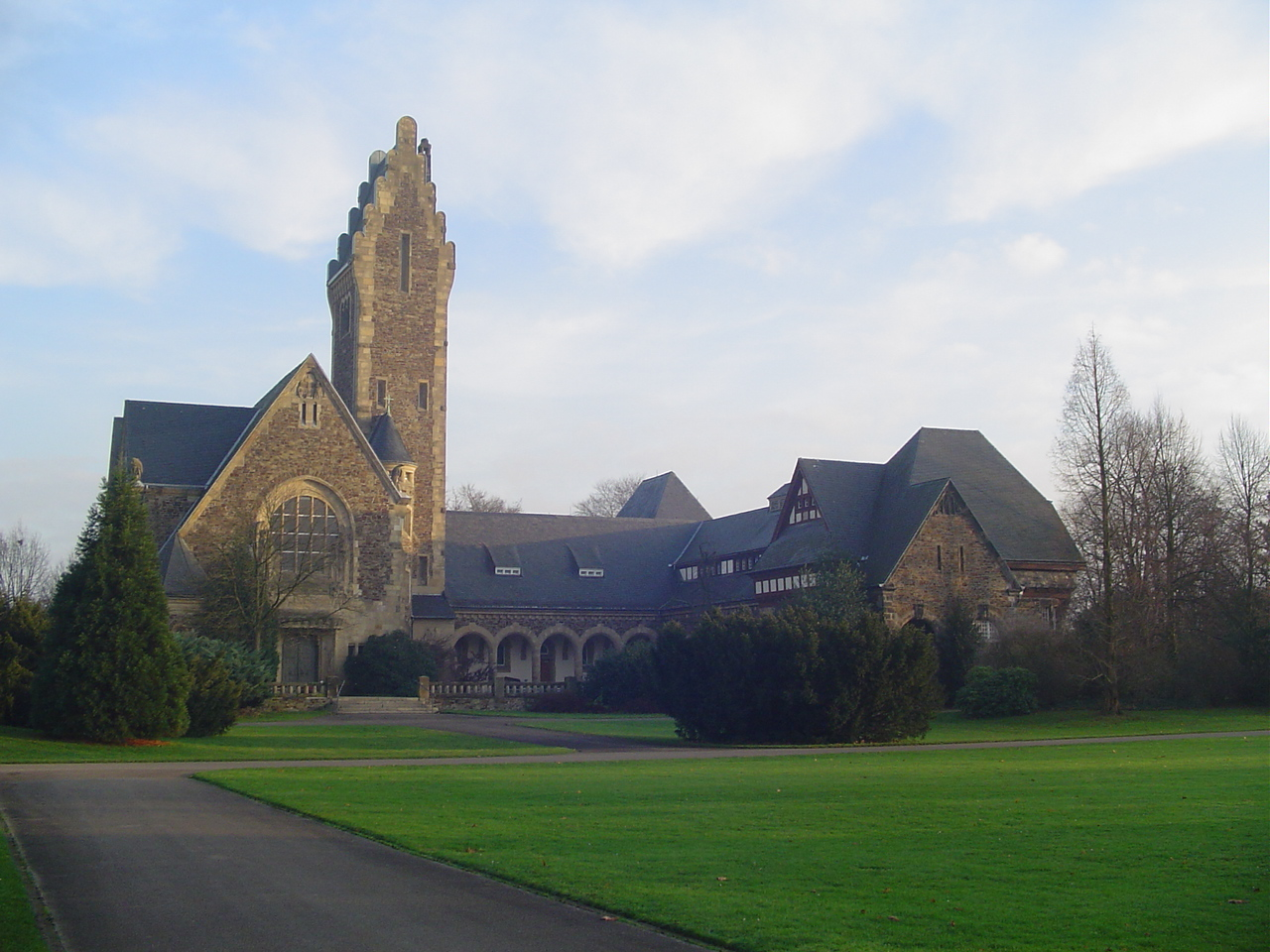 Friedhofskapelle mit Leichenhaus auf dem Südfriedhof in Düsseldorf-Bilk